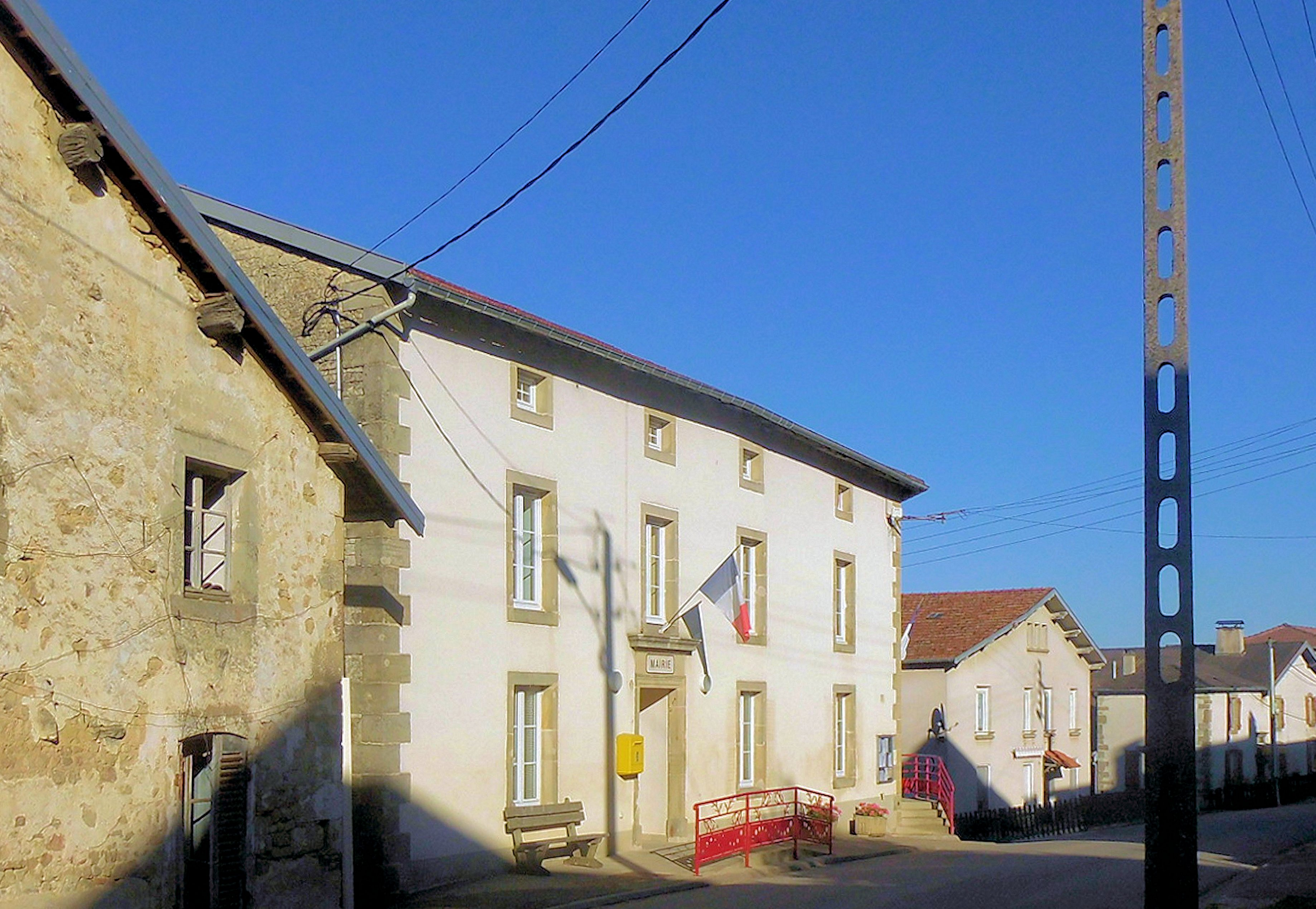 La mairie de Serécourt